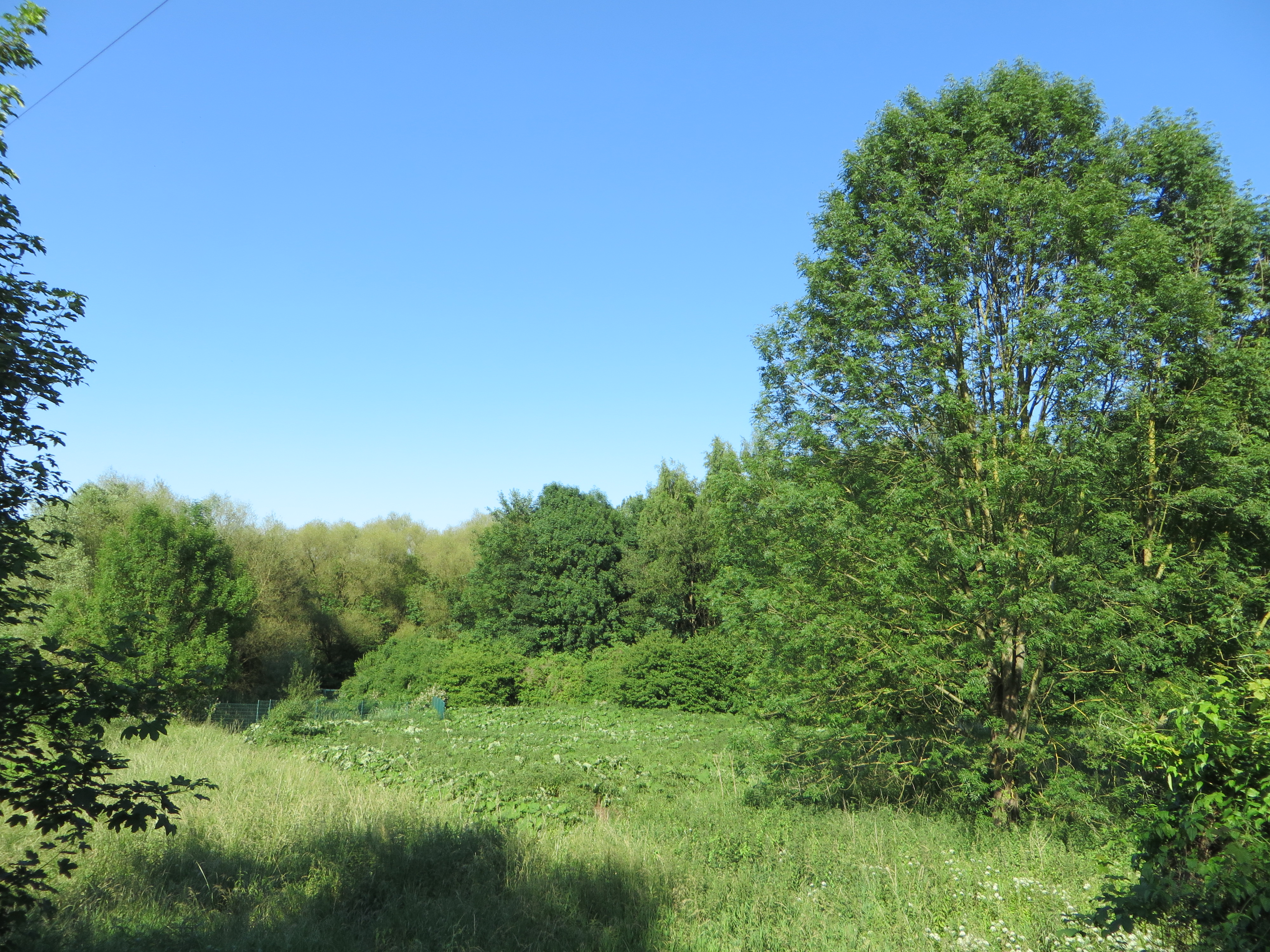 Geschützter Landschaftsbestandteil 1.4.2.37 „Wiesenbrink“ in Hagen, südöstlich des Autobahnkreuzes Hagen bei Herbeck. Es handelt sich um den Restbestand eines Laubmischwaldes mit Quellbereich sowie angrenzenden feuchten Schlagfluren und einer Wiesenbrache im Verbuschungsstadium mit Tümpel im Landschaftsschutzgebiet Barmerfeld.